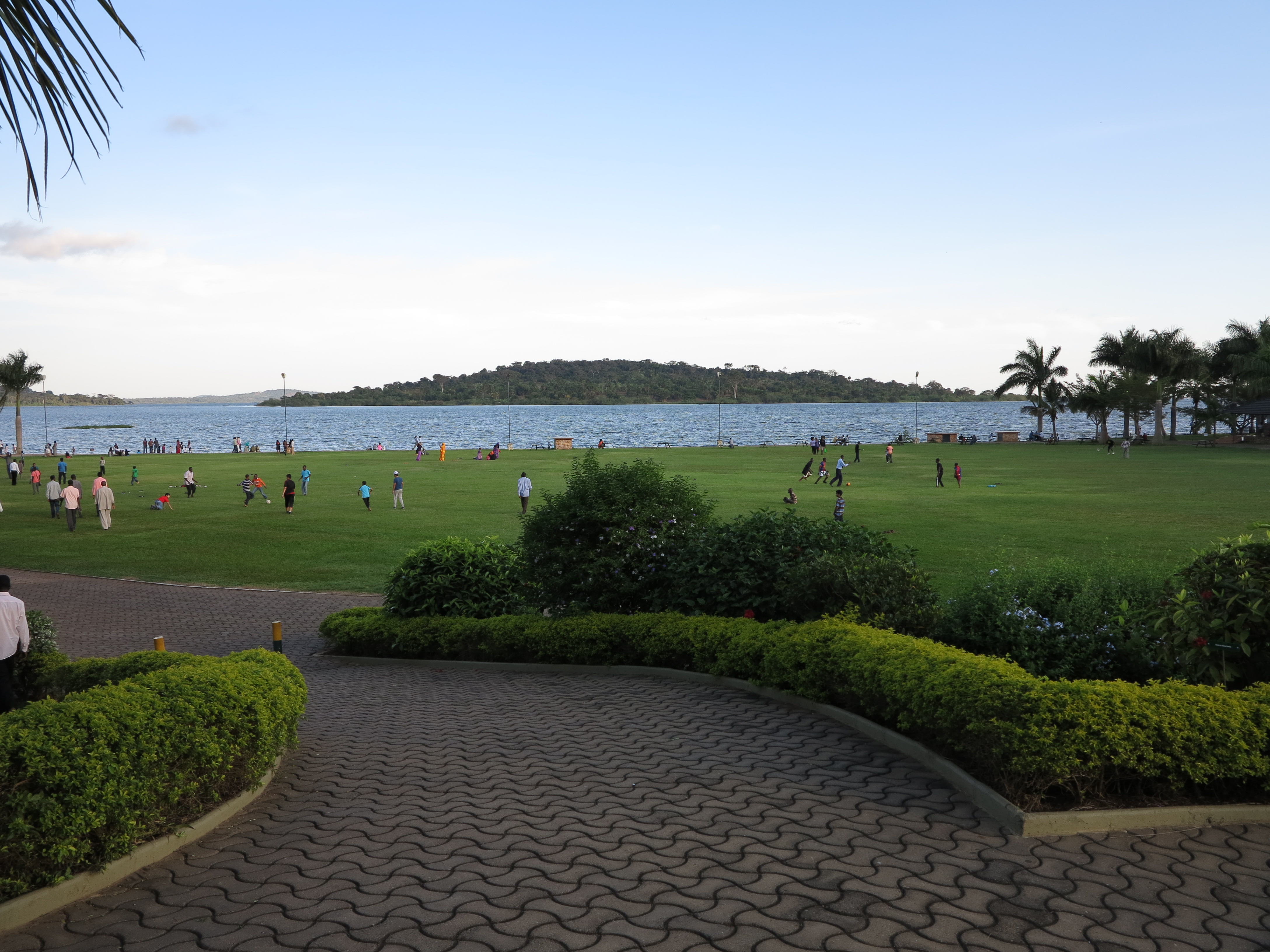 KAMPALA.LAKE VICTORIA.1